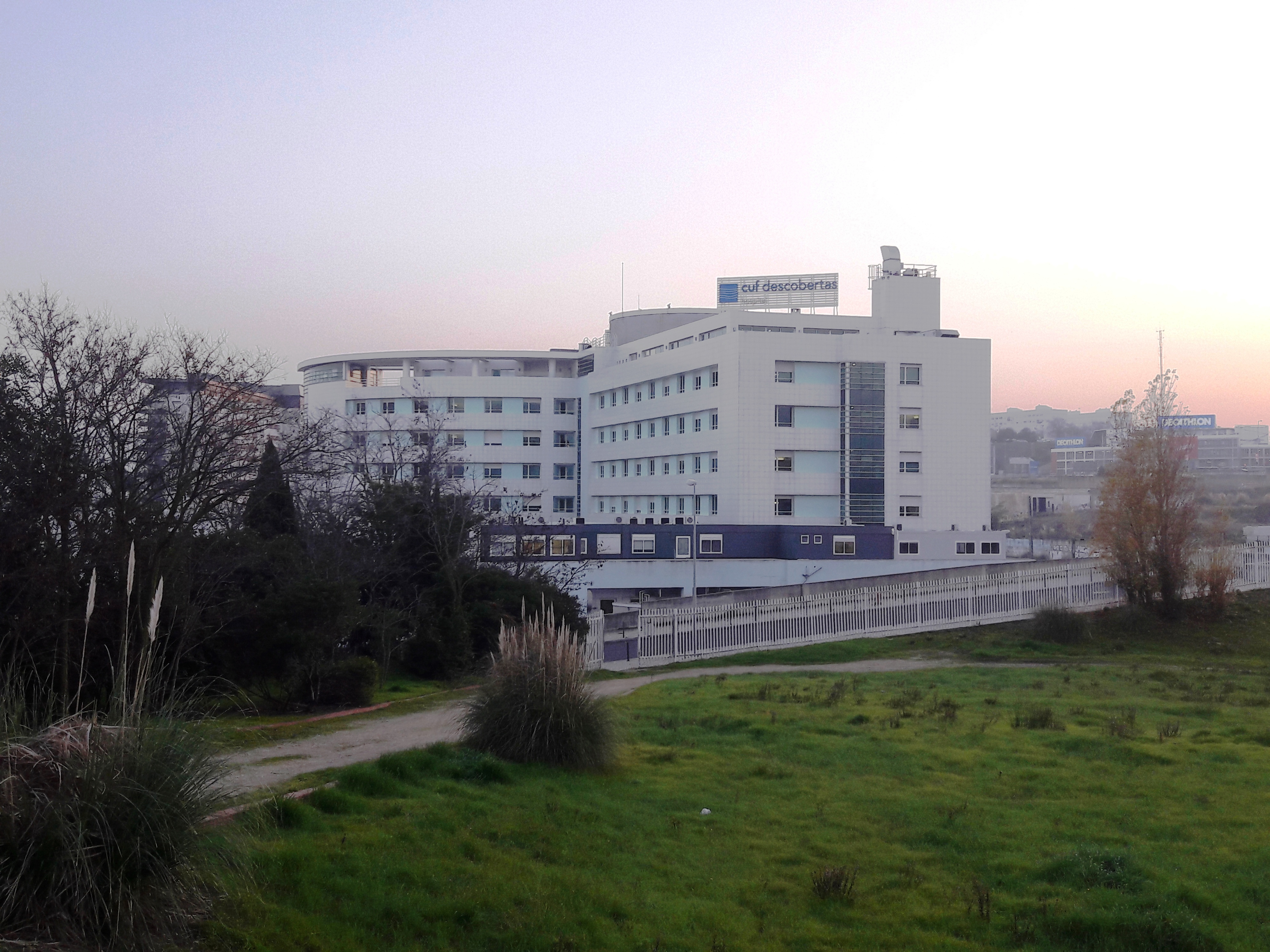 Hospital Cuf Descobertas, Parque das Nações, Lisboa